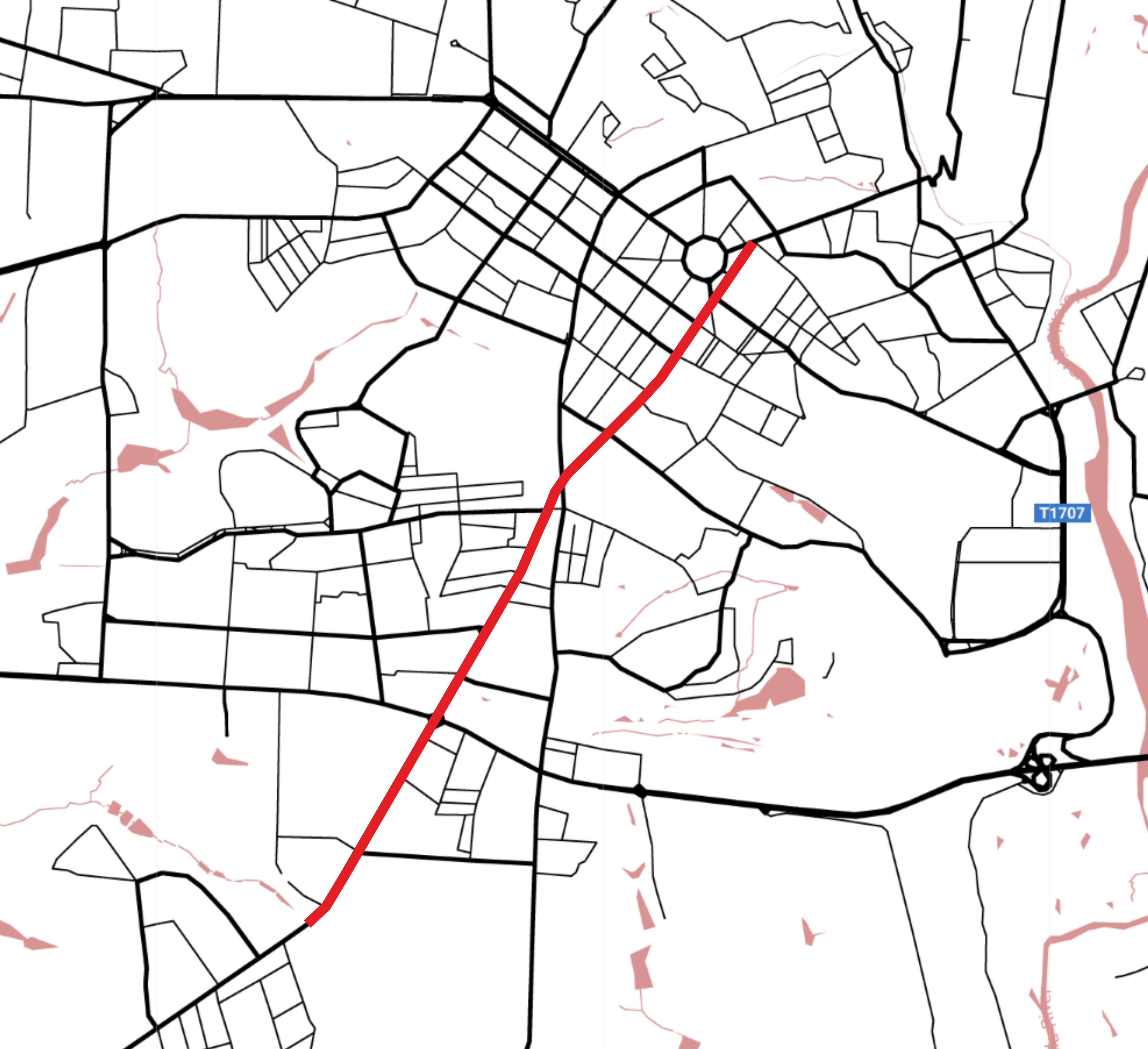 Положення вулиці Європейської на мапі м. Полтава